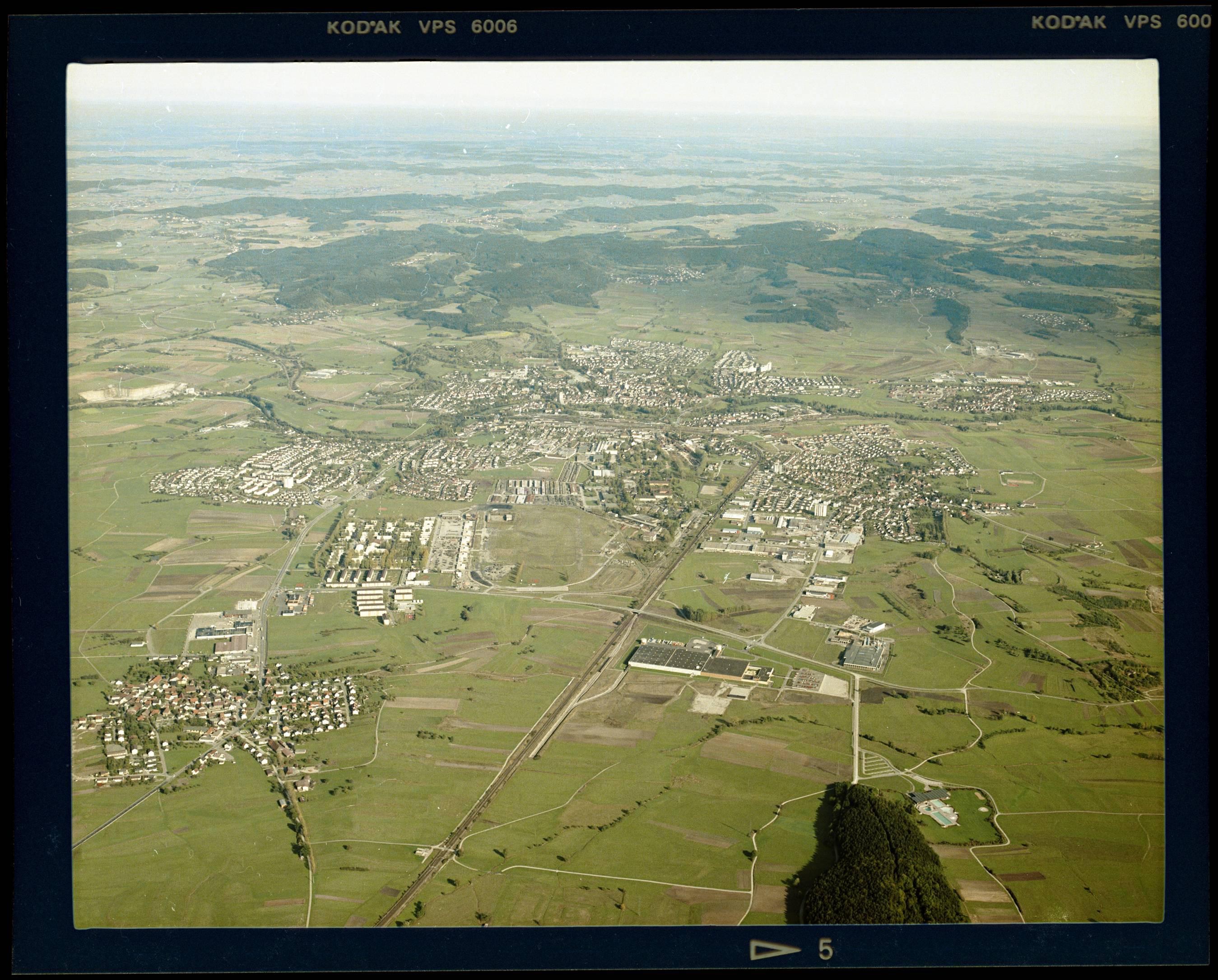 Luftbild von Crailsheim - Staatsarchiv Sigmaringen - Archivalieneinheit N 1/96 T 1 Nr. 617